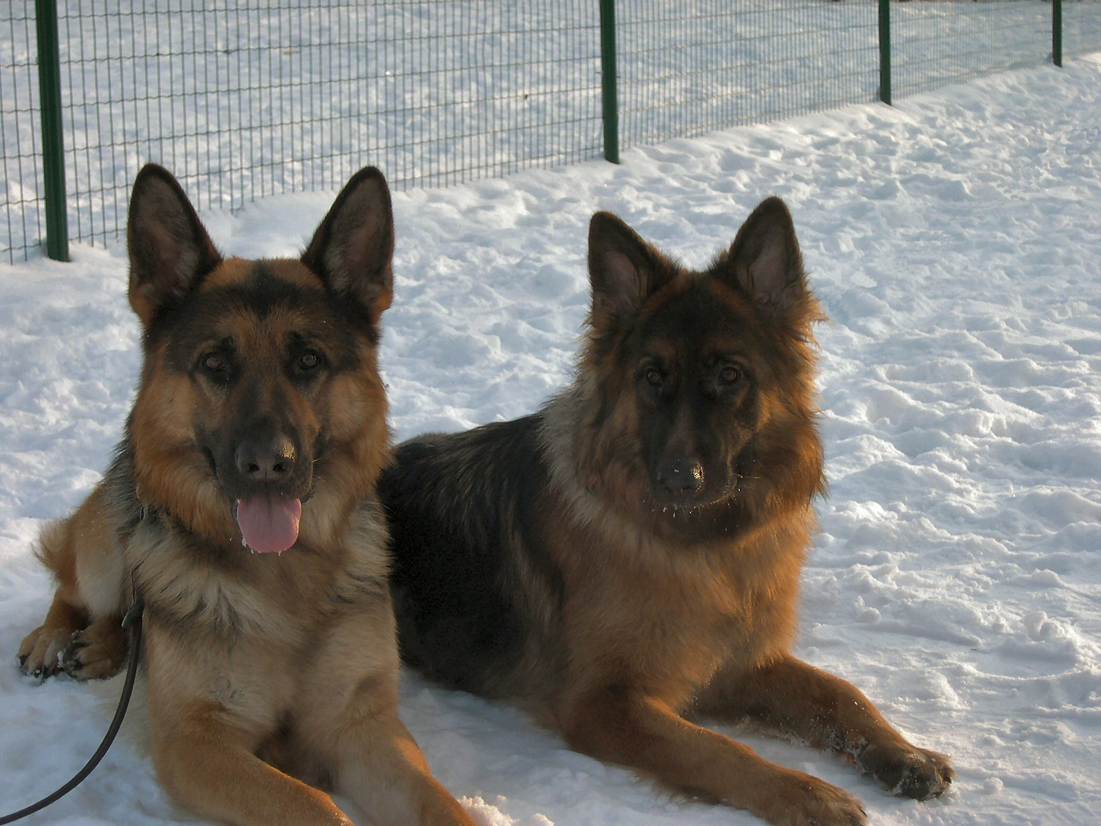 German Shepherd Dogs